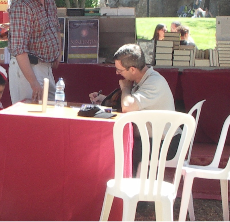 Fernando Quesada Sanz firmando libros en Tarraco Viva 2009